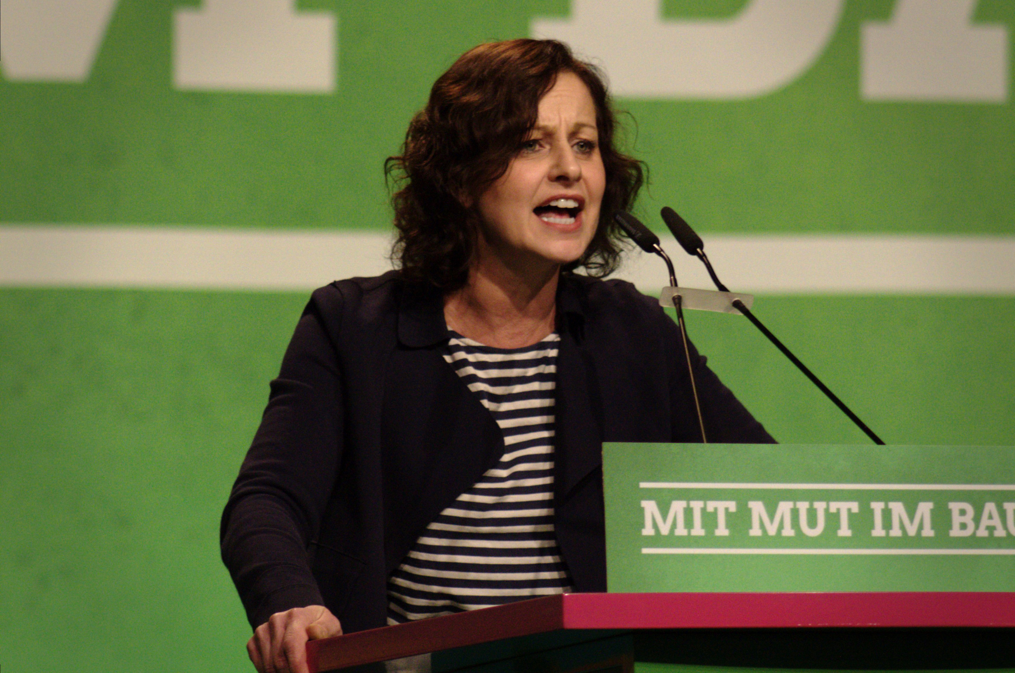 Sigi Hagl auf dem Bundesparteitag der Grünen in Halle (Saale) 2015